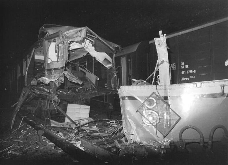 ADN-ZB Weisflog-19.12.1979-cb Berlin: Auf der Strecke Schönfließ-Blankenburg fuhr am 18.12.1979 ein aus Oranienburg kommender S-Bahnzug auf einen haltenden Güterzug auf. Dabei kam der Triebwagenführer ums Leben; mehrere Fahrgäste erlitten Verletzungen. Hier ein Blick auf die Unglücksstelle.